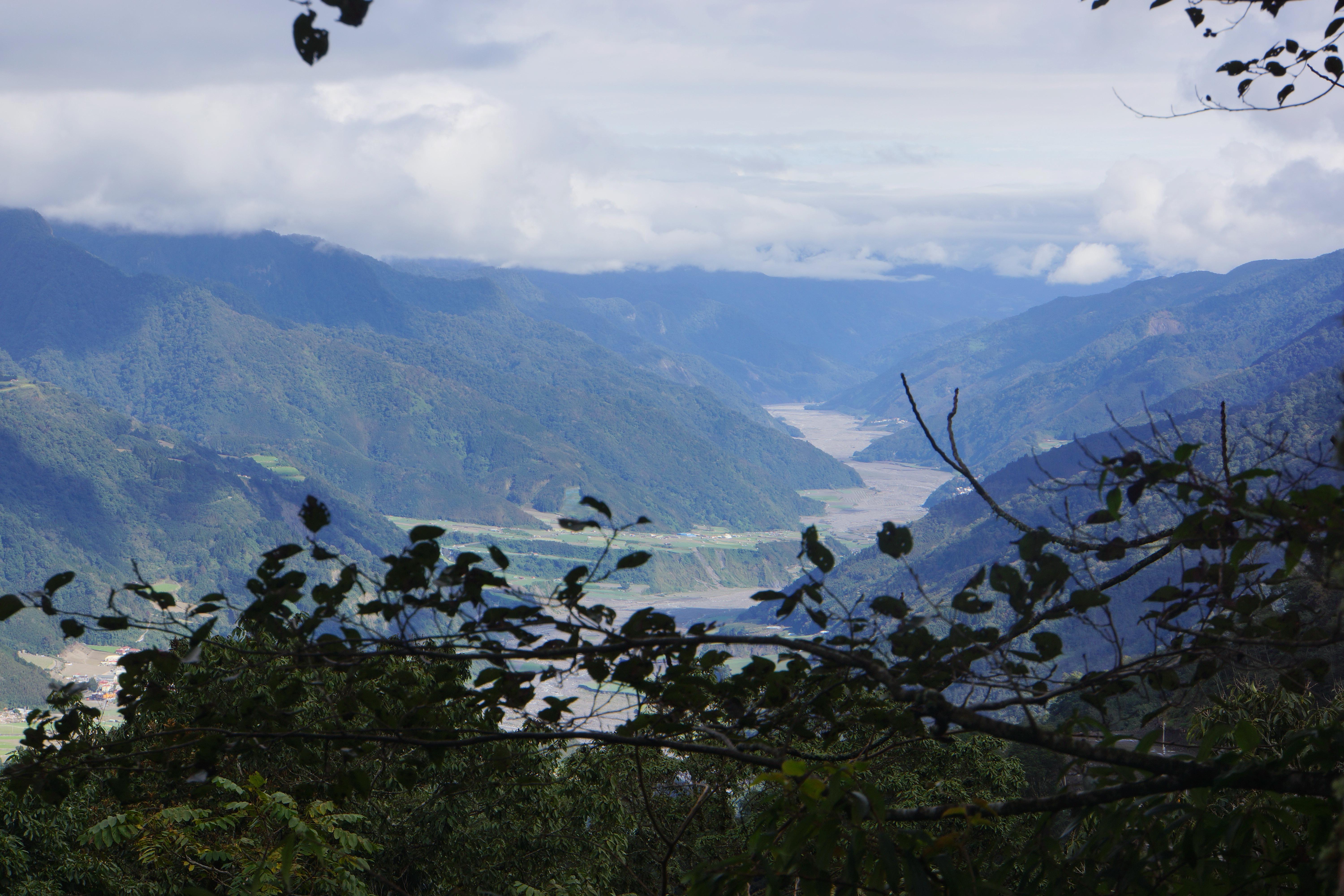 蘭陽河谷 Lanyang River Valley